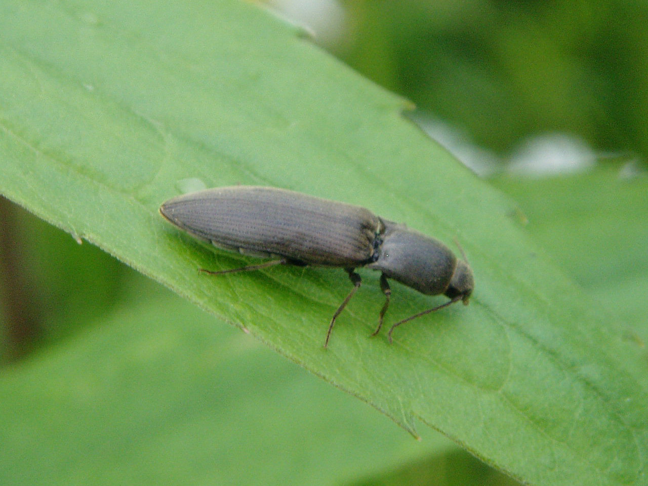 Agriotes lineatus, taupin.